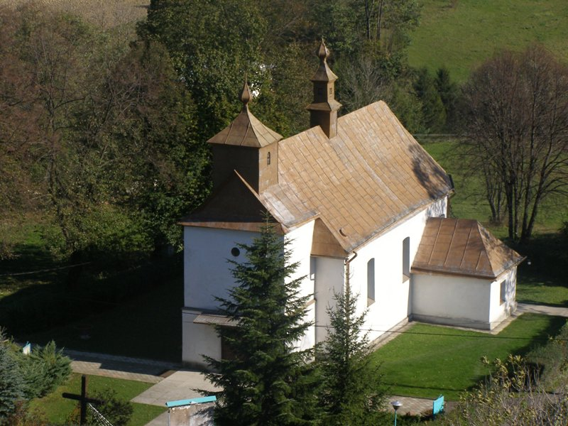 Cerkiew św. Mikołaja w Czaszynie. Zdjęcie wykonane z wieży nowego kościoła.